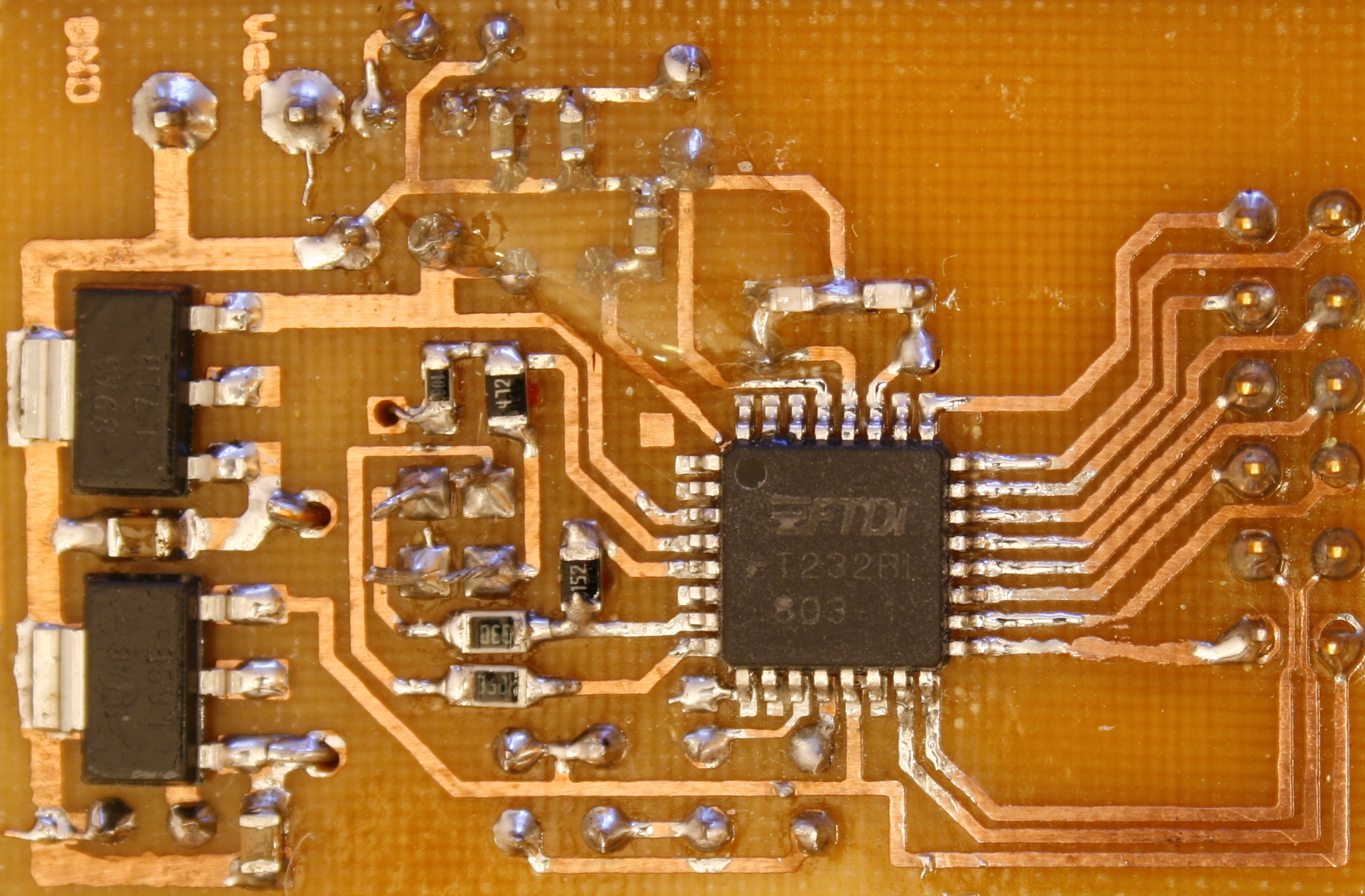 Pildil on firma FTDI toodetud USB andmevahetuse UART muutmise mirkoskeem FT232BL.